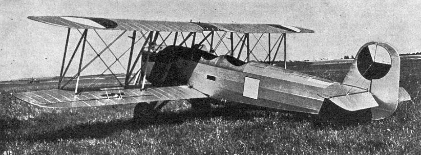 Praga BH-41/Praga E-41 (Letectví, červenec 1931)